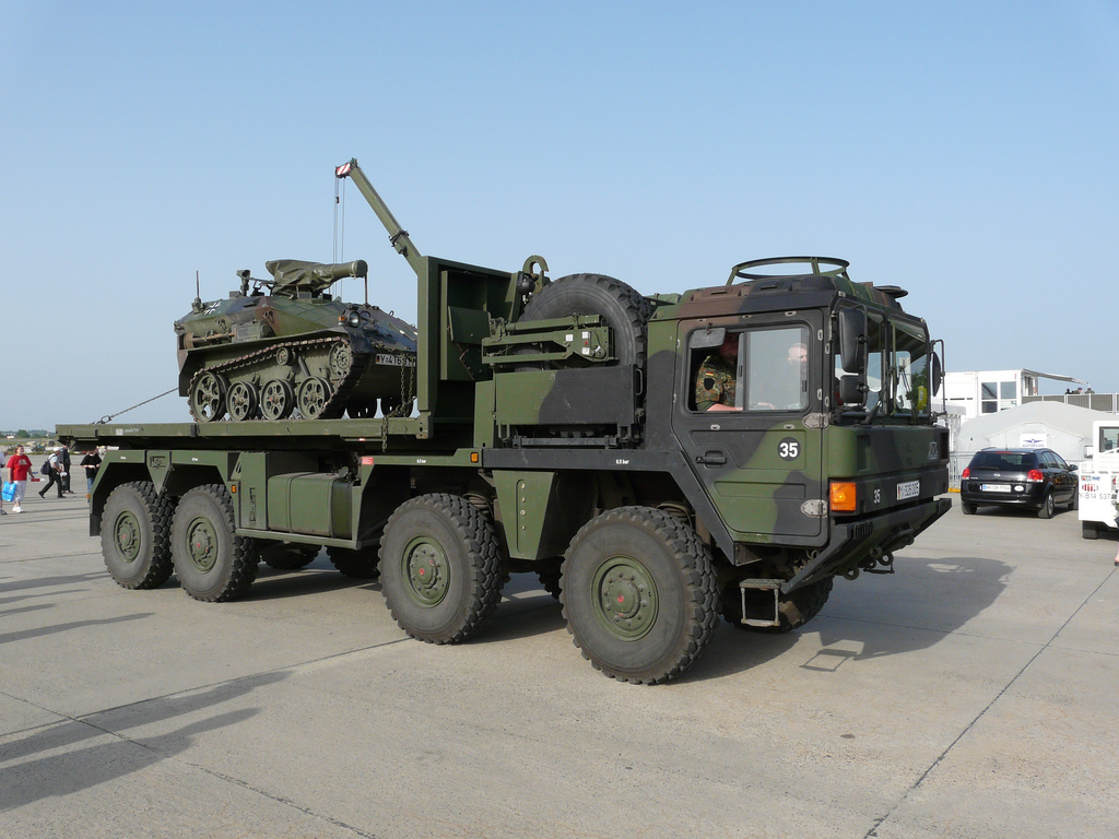 Ein Wiesel TOW auf einem MAN 8×8 truck.